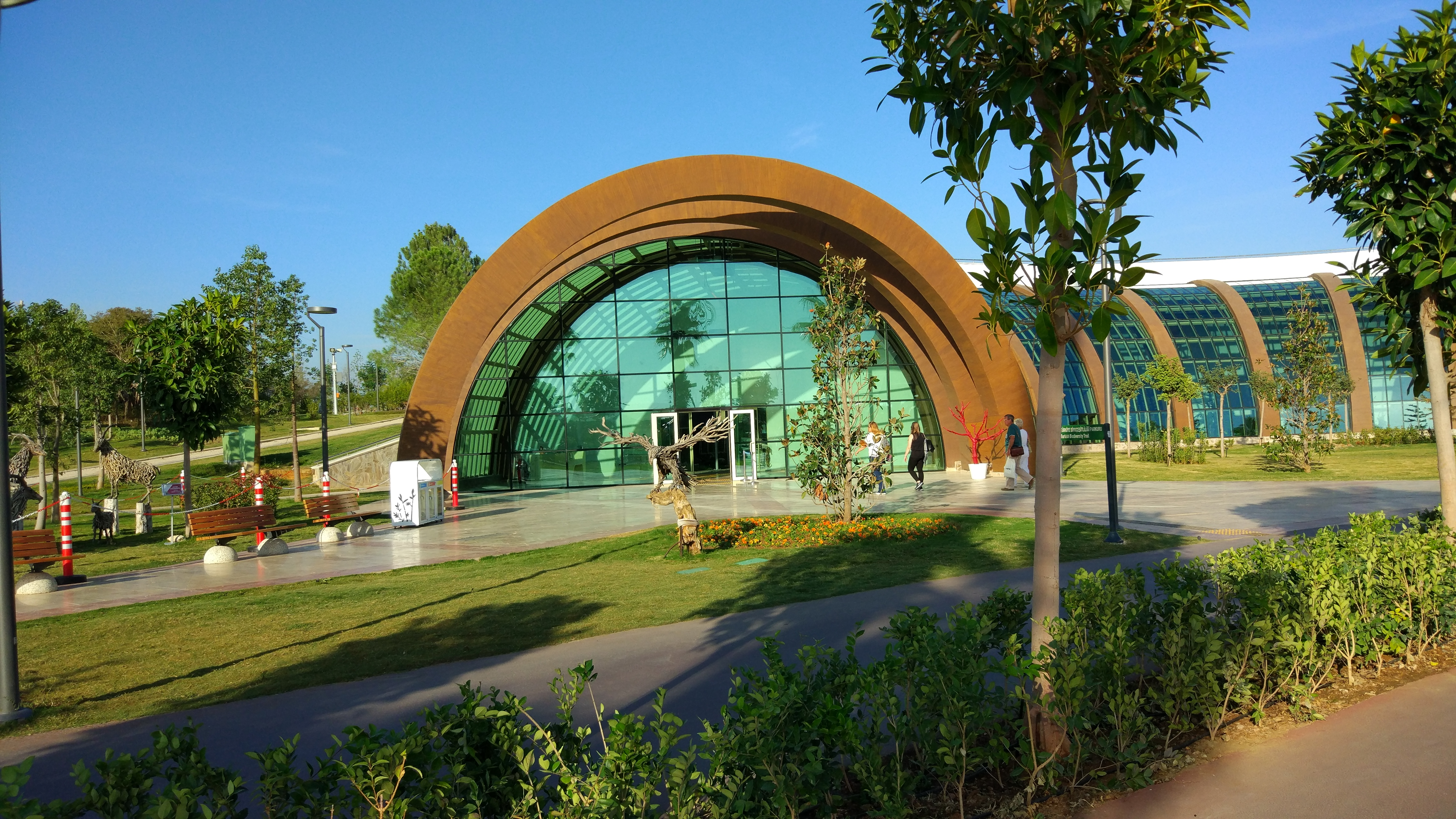 Türkiye Biyoçeşitliliği Tema Parkuru giriş kapısı.